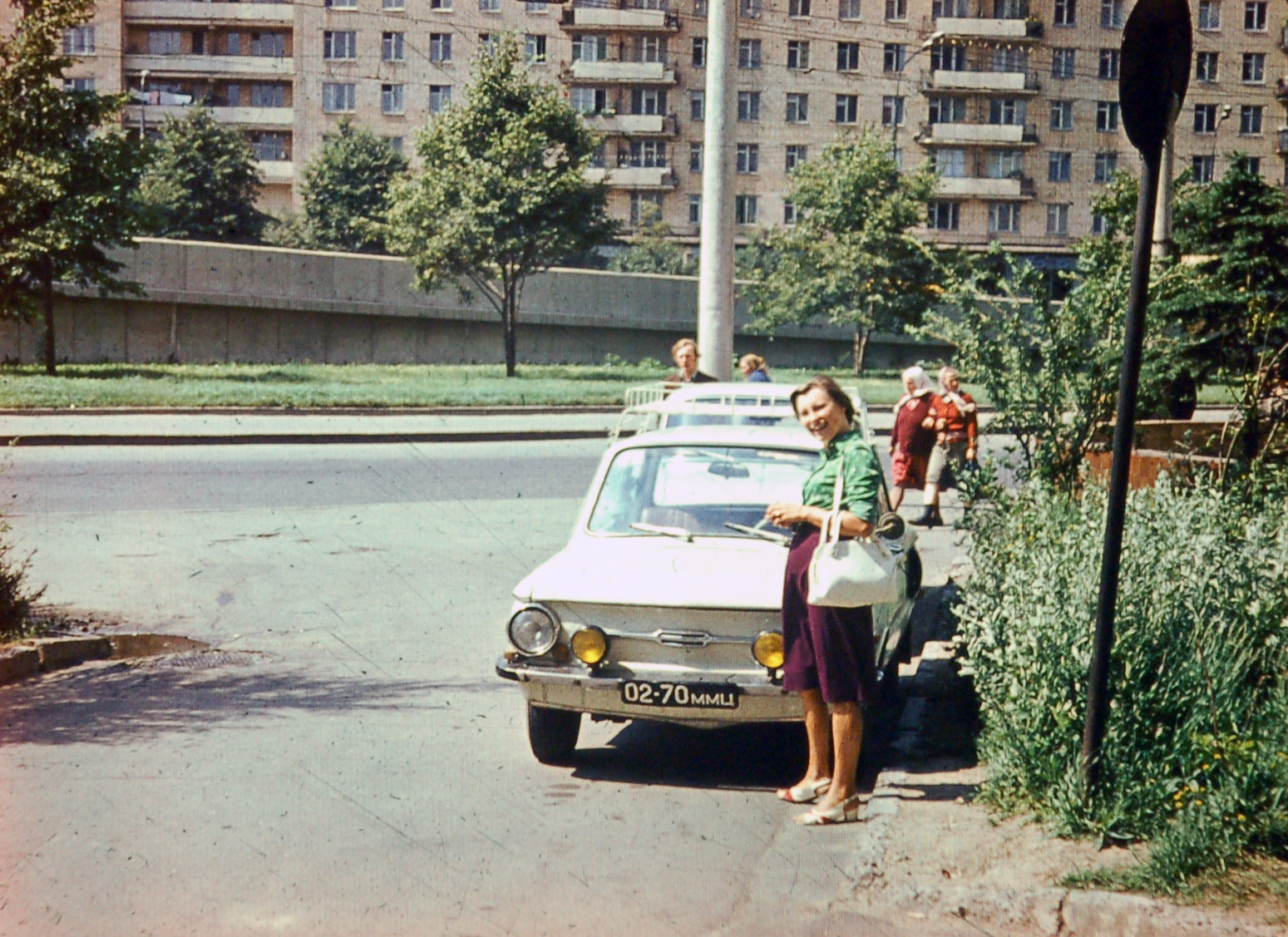 А эта мечта могла сбыться: наличие халтур, доп. нагрузок и непьющего мужа.